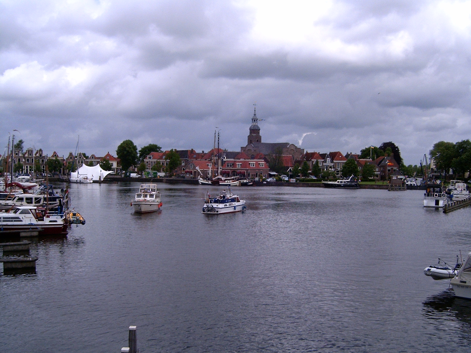 Blokzijl Blokzijl